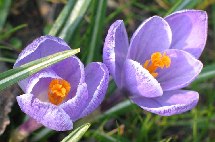 Crocus Cultivar (not Crocus sativus)